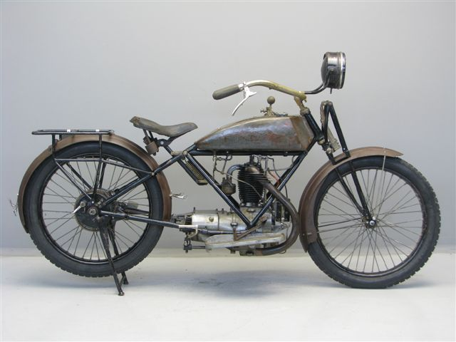 Krieger-Gnädig 500 cc motorcycle from 1922